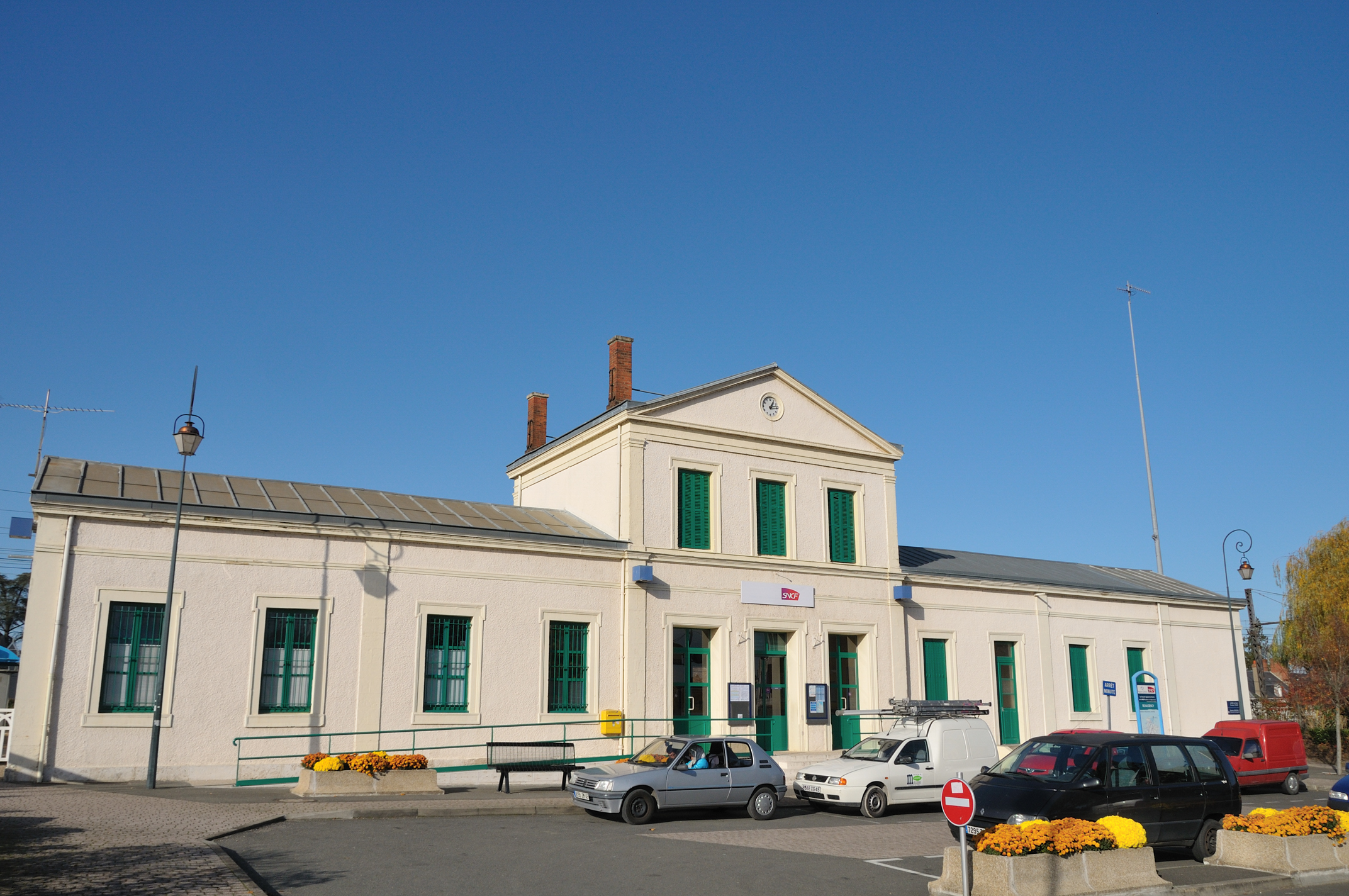 Gare de Beaugency, Loiret, France